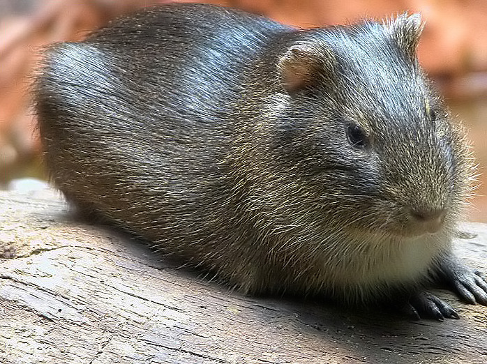 Wildmeerschweinchen (Cavia aperea) im Exotarium des Zoos Frankfurt